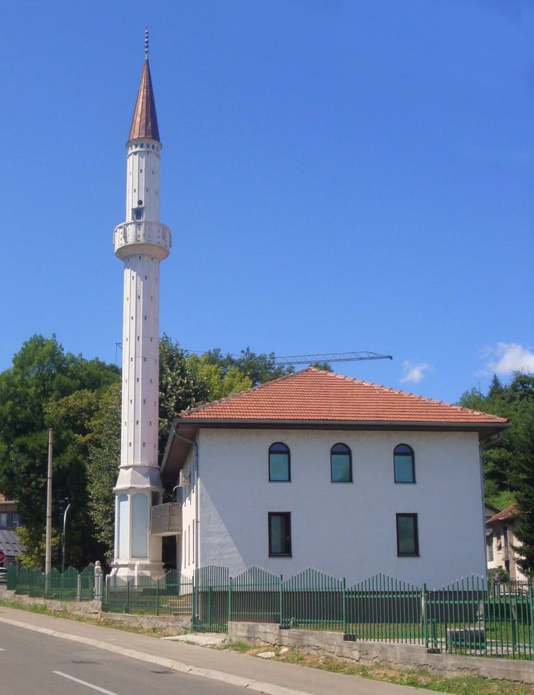 Сефер-бегова џамија